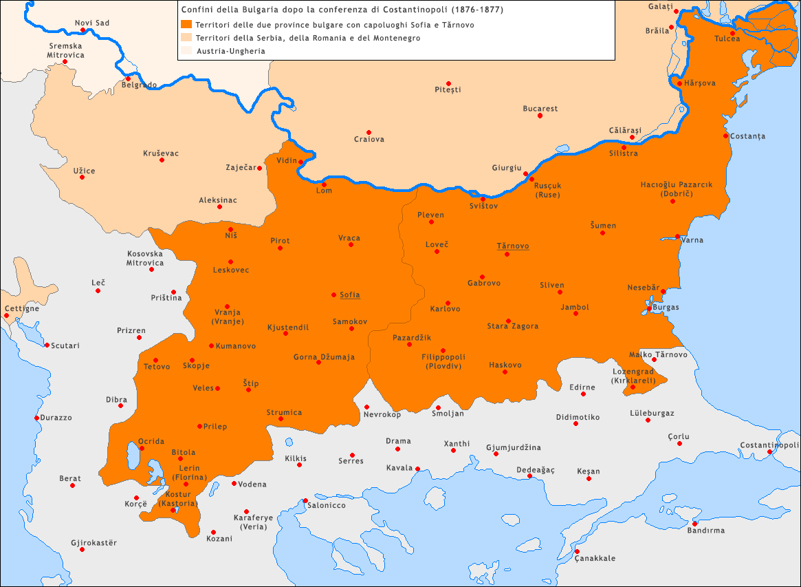 La due province bulgare dopo la Conferenza di Costantinopoli del 1876-1877, con capoluoghi Sofia e Tărnovo